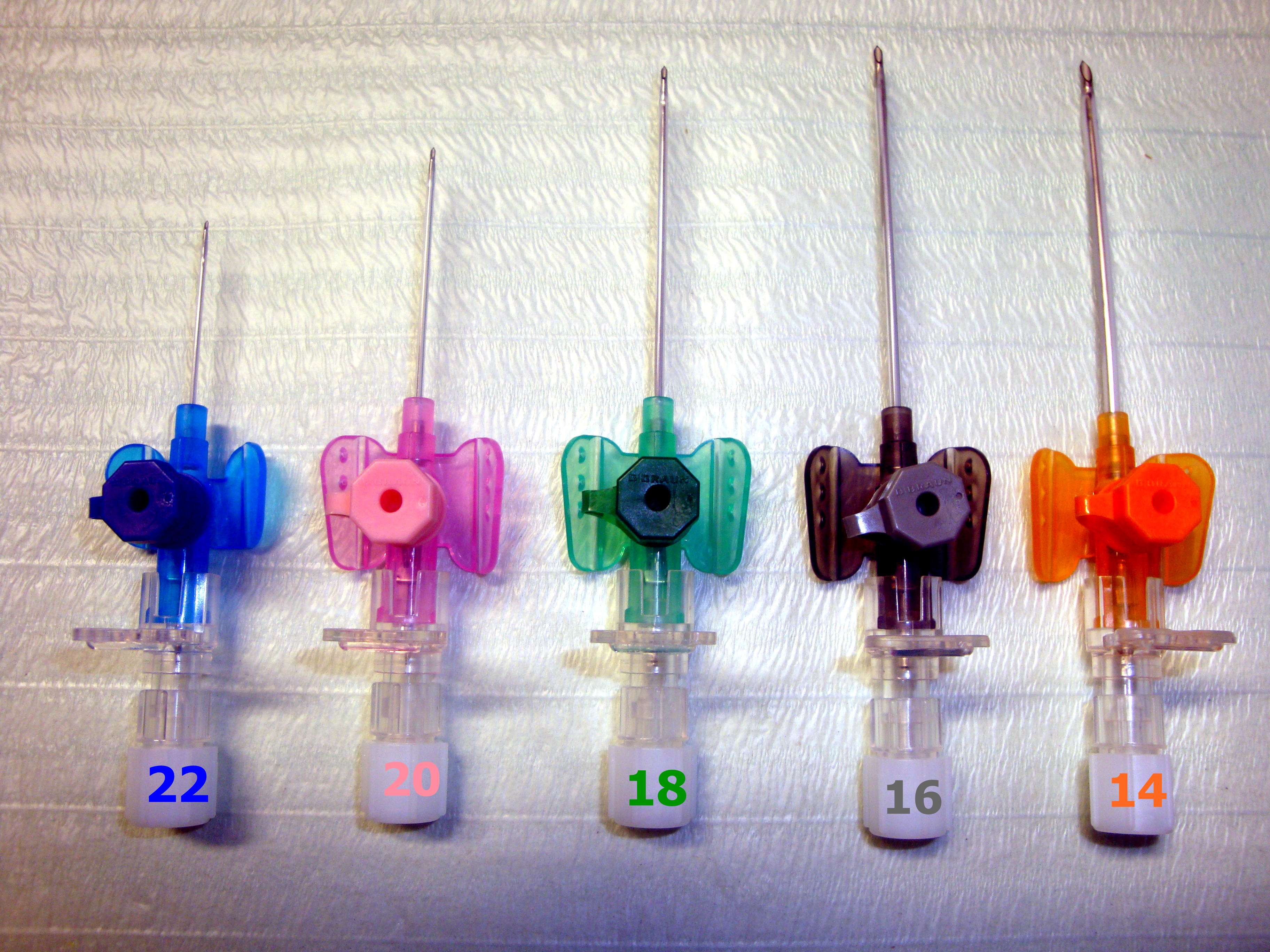 Müxtəlif ölçülü venadaxili kateterlər.